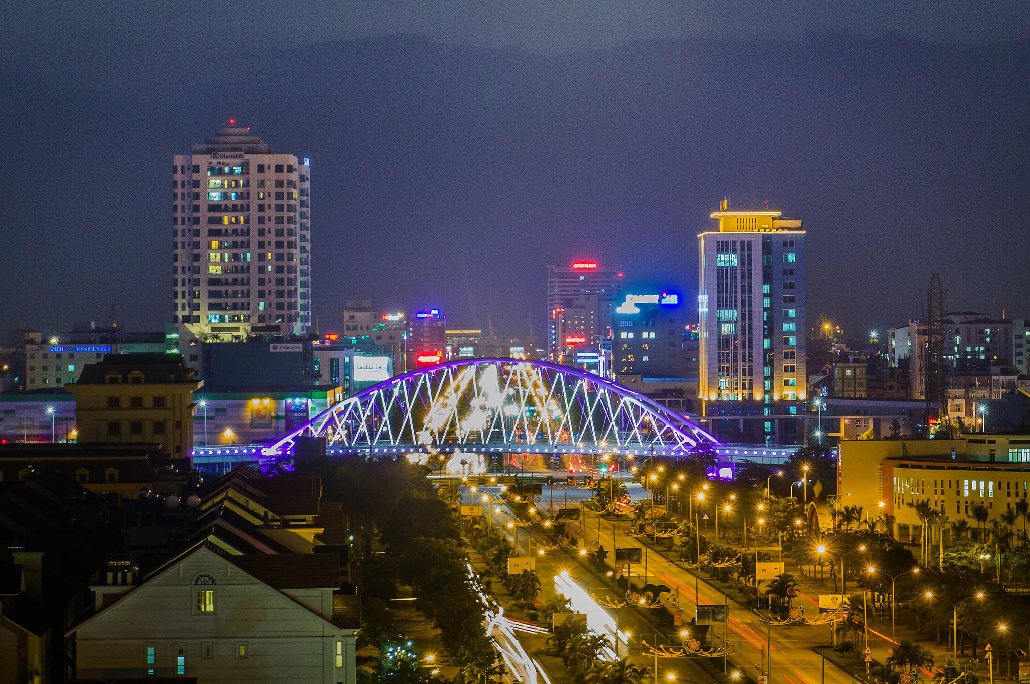 Thành Phố Hải Phòng - Tác Giả bức ảnh Trịnh Tiến Hưng đăng lên .